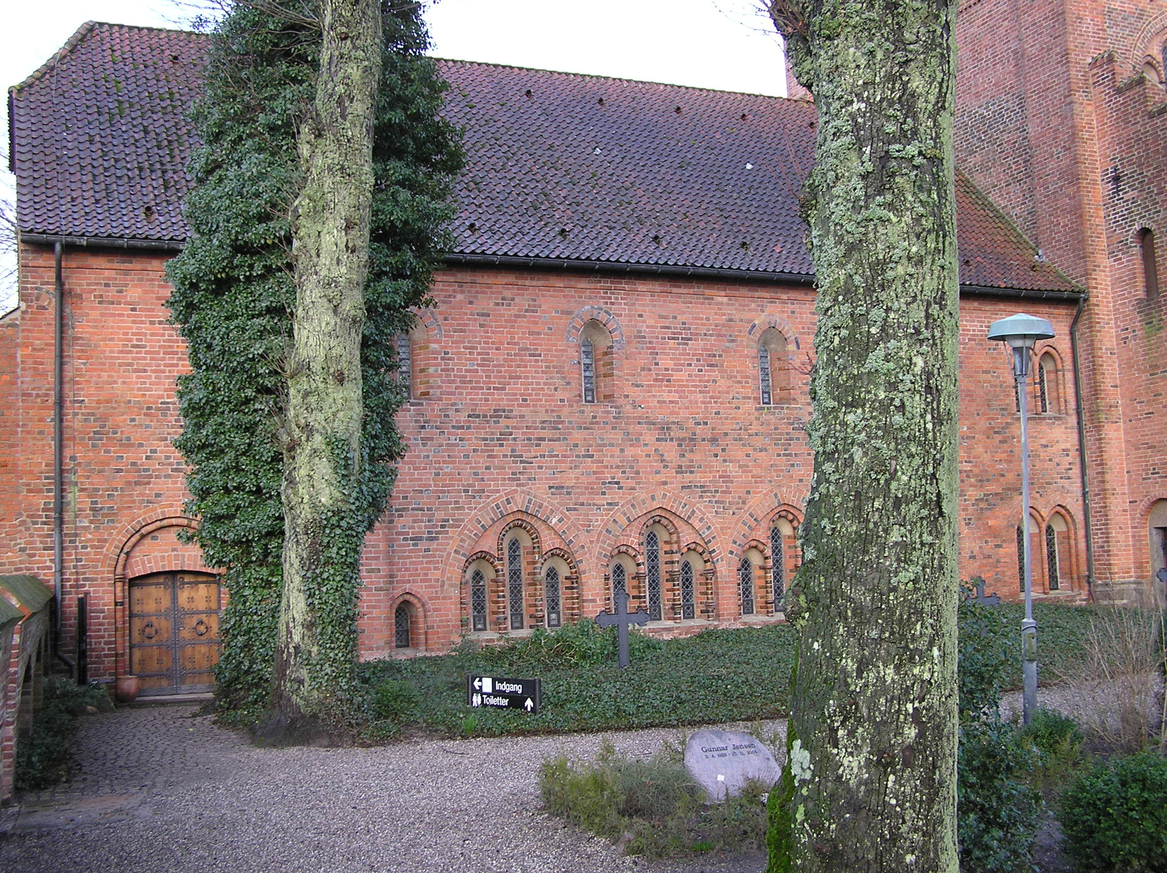 Løgumkloster Klosterfløj